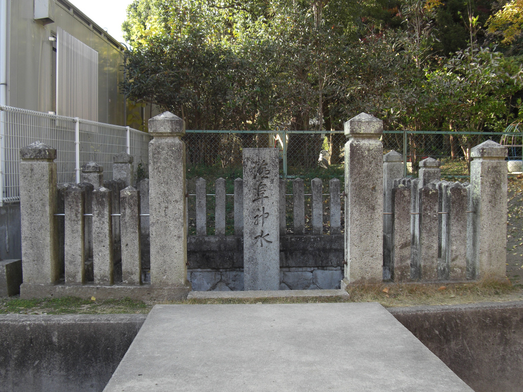 兵庫県姫路市林田町 塩阜親水